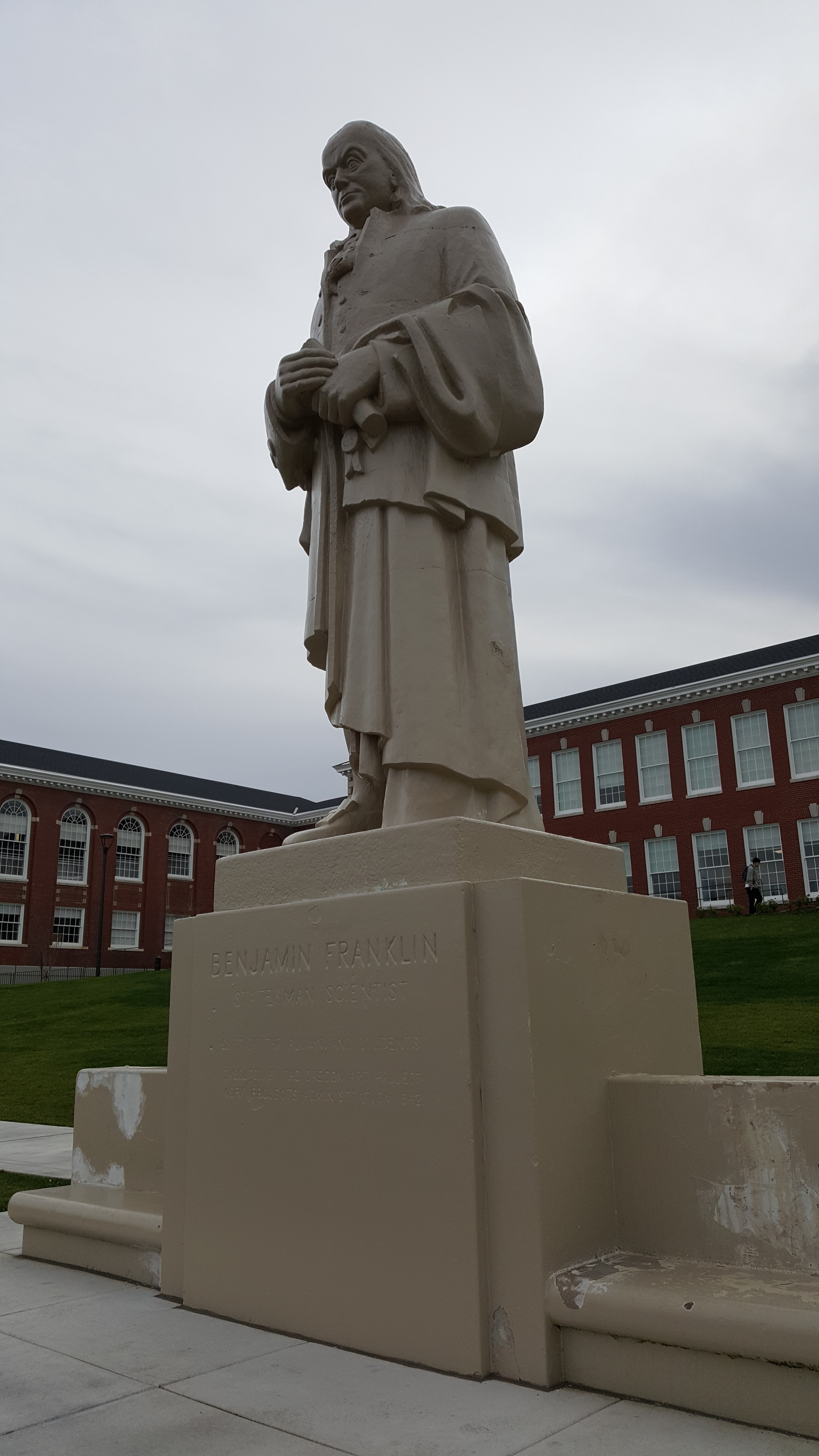 Franklin HS